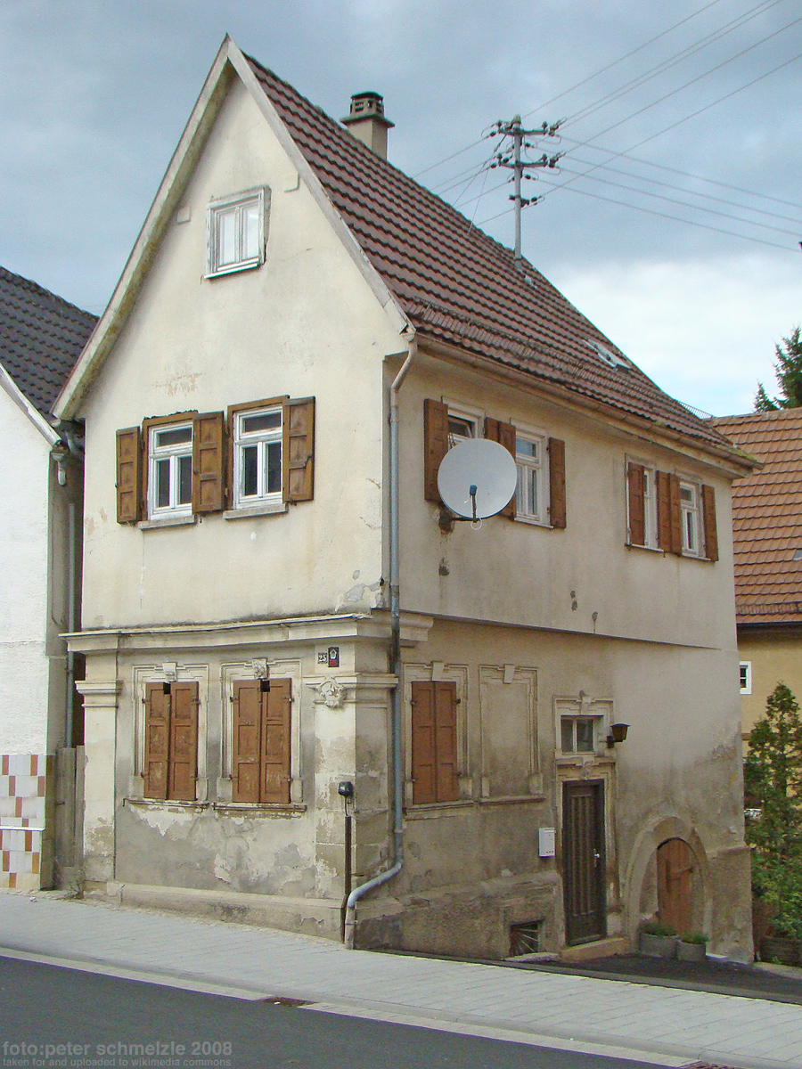 Wohnhaus des Deutschordens in Heilbronn-Biberach